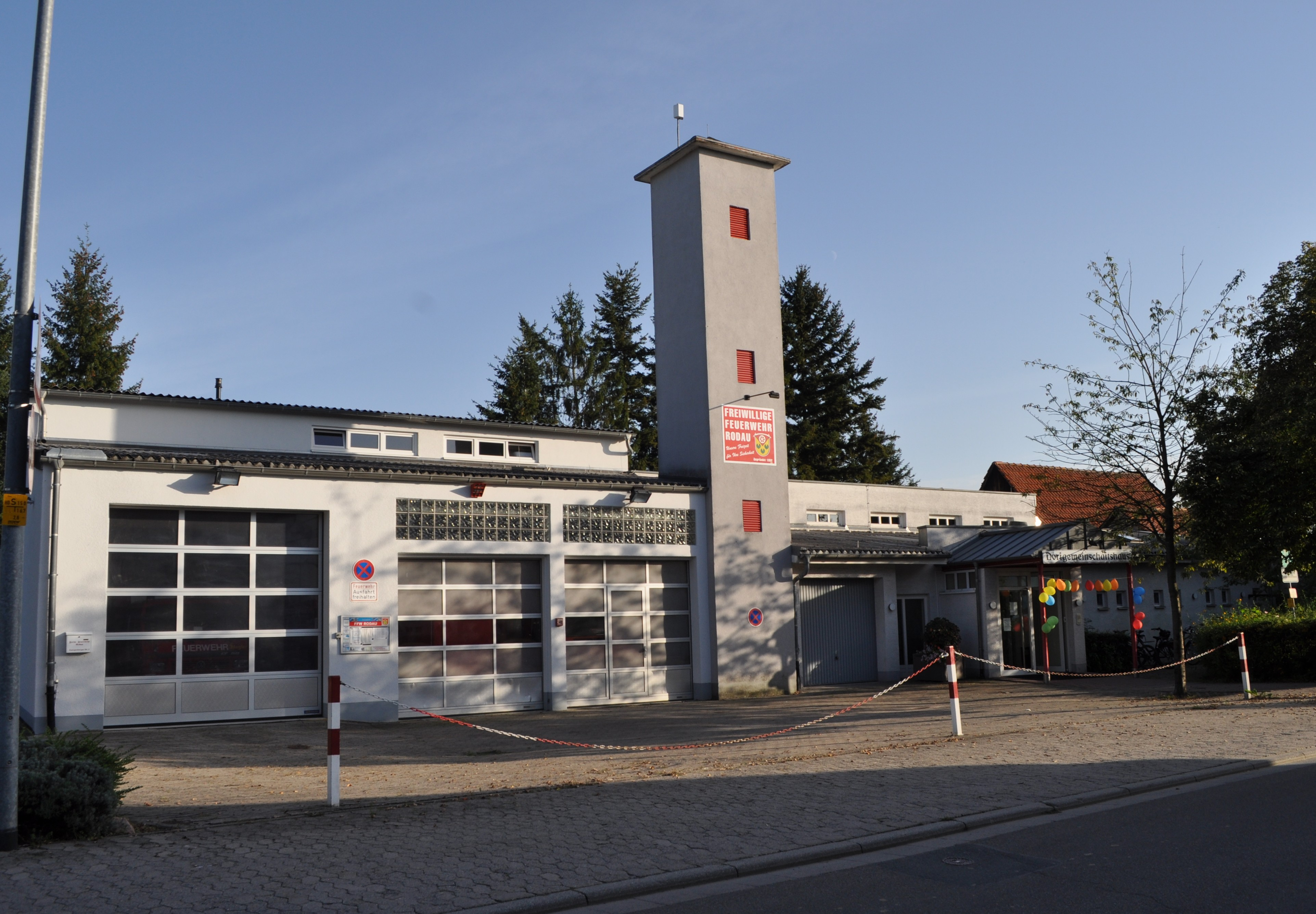 DGH und Feuerwehr in Rodau